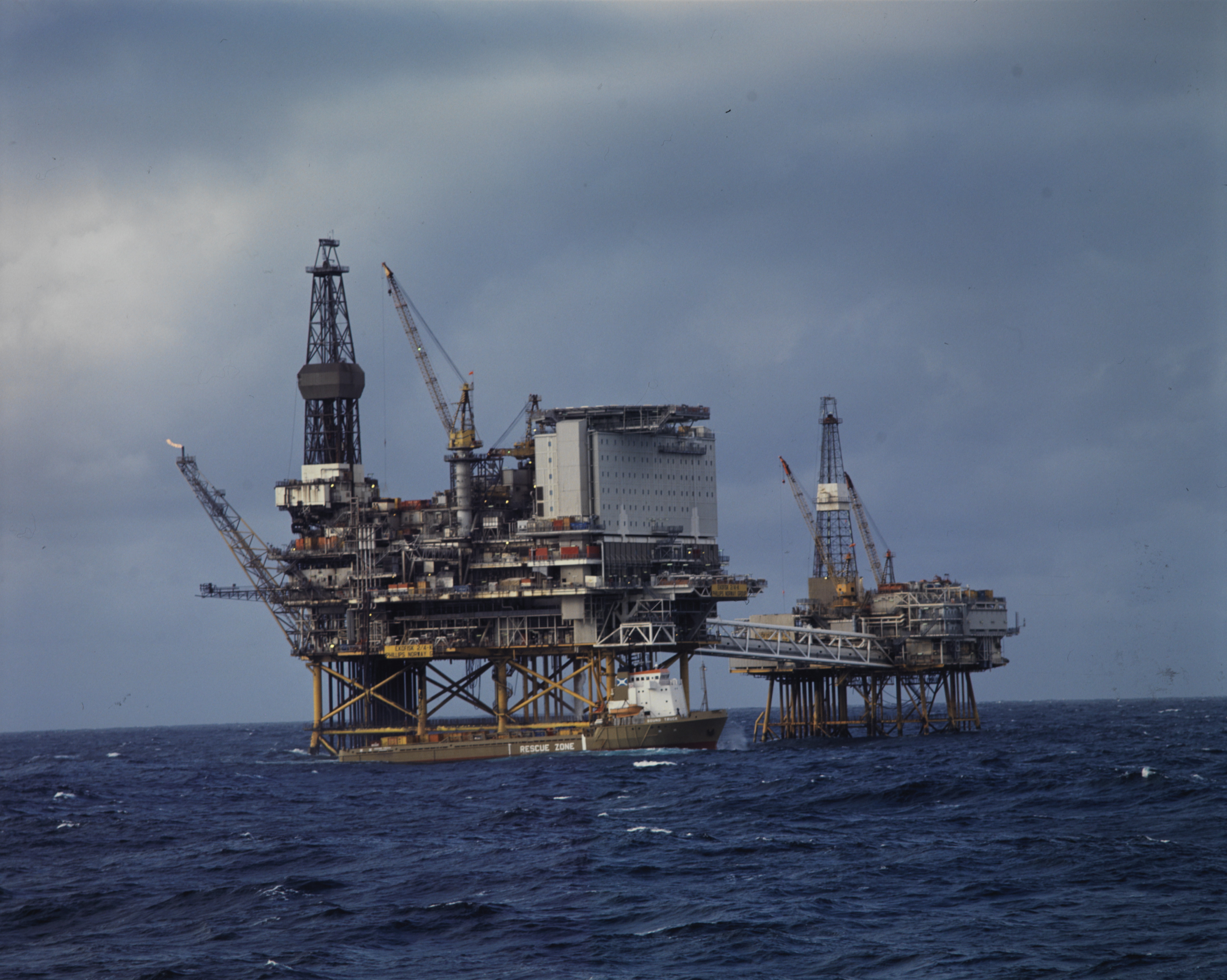 Foto av oljeplattformene Ekofisk 2/4 K og 2/4 B. Ekofisk-feltet - operatør Phillips. Blokk 2/4 Nordsjøen